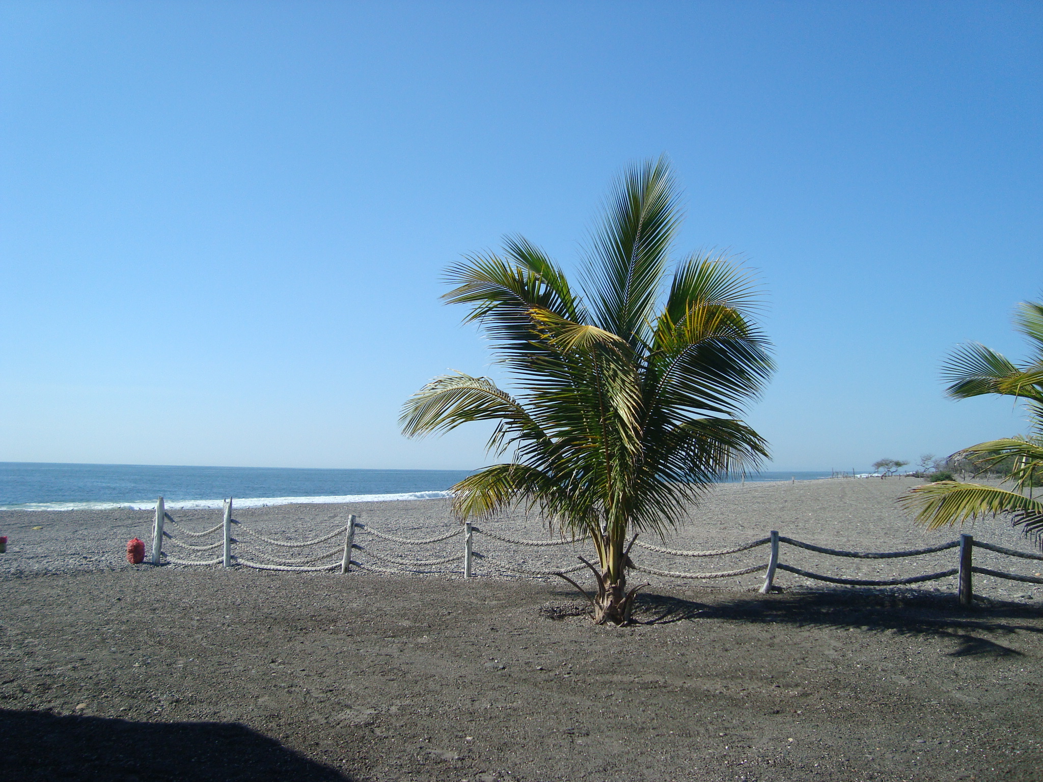 Petacalco, Gro